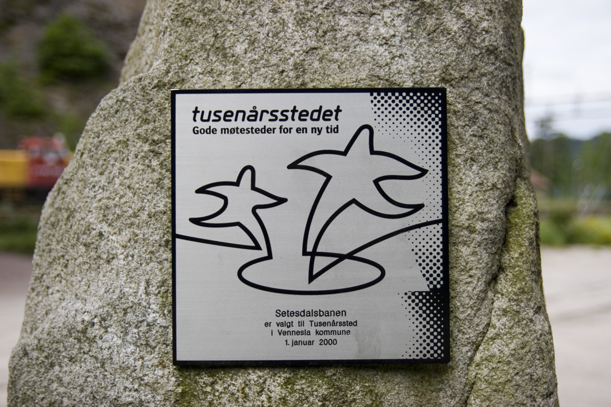 Plakett Tusenårsstedet i Vennesla